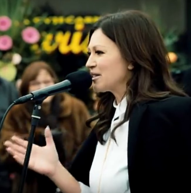 La cantante nina badric, cantando en una calle de zagreb en un programa de la HRT